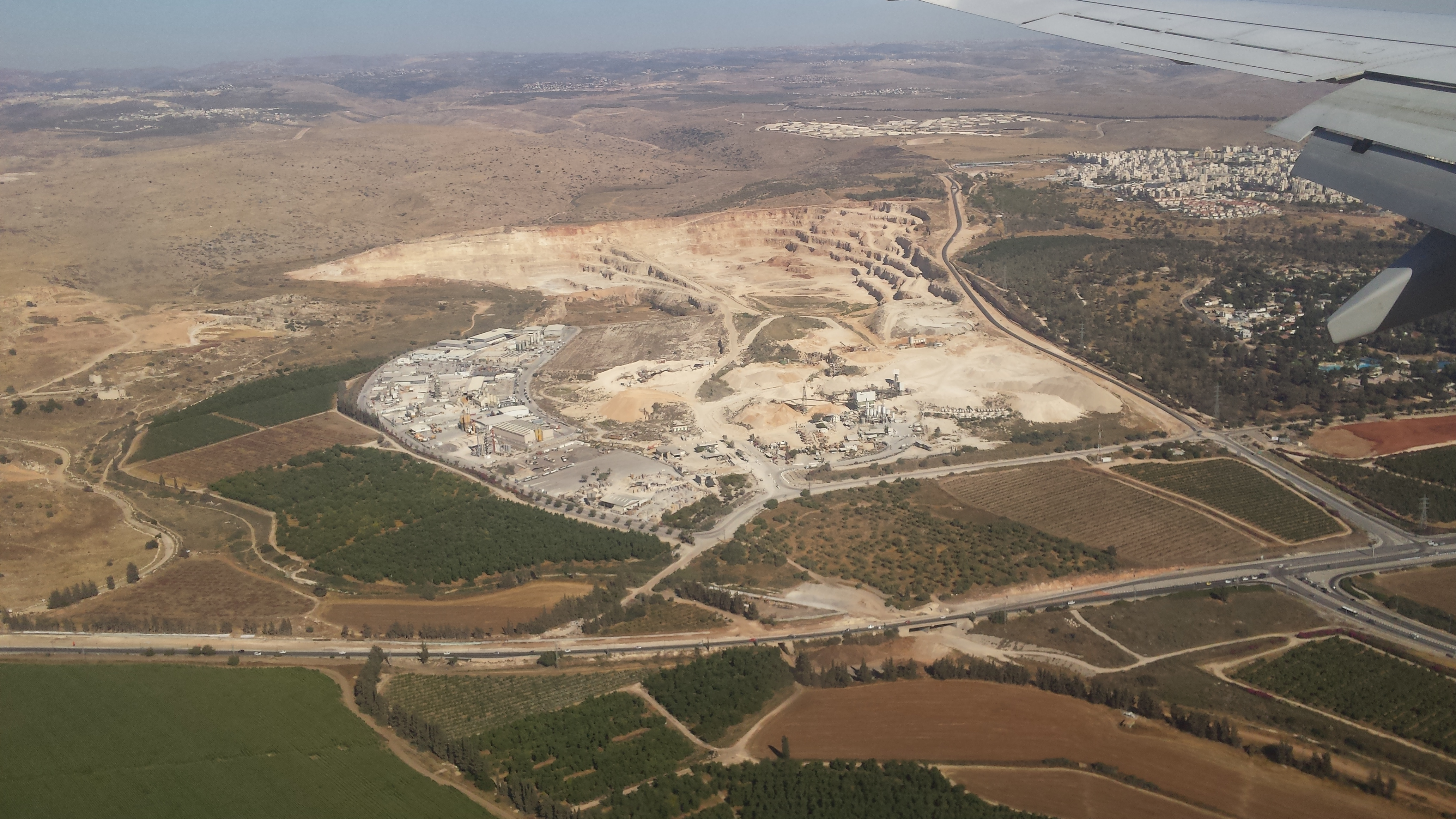 צילום מהאוויר